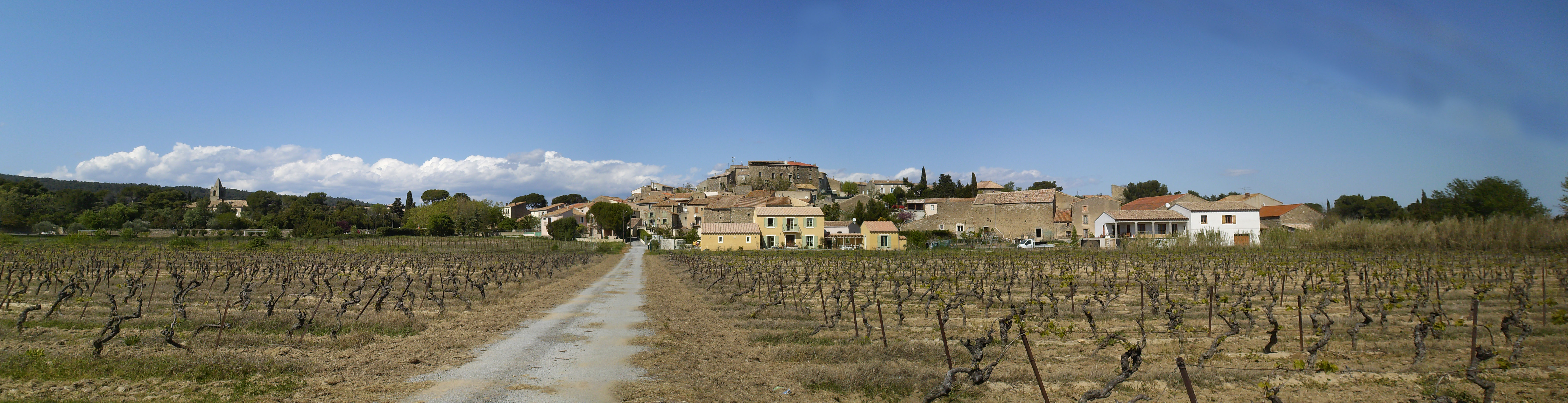 Panorama de Pouzols-Minervois pris depuis le chemin de l'Horte